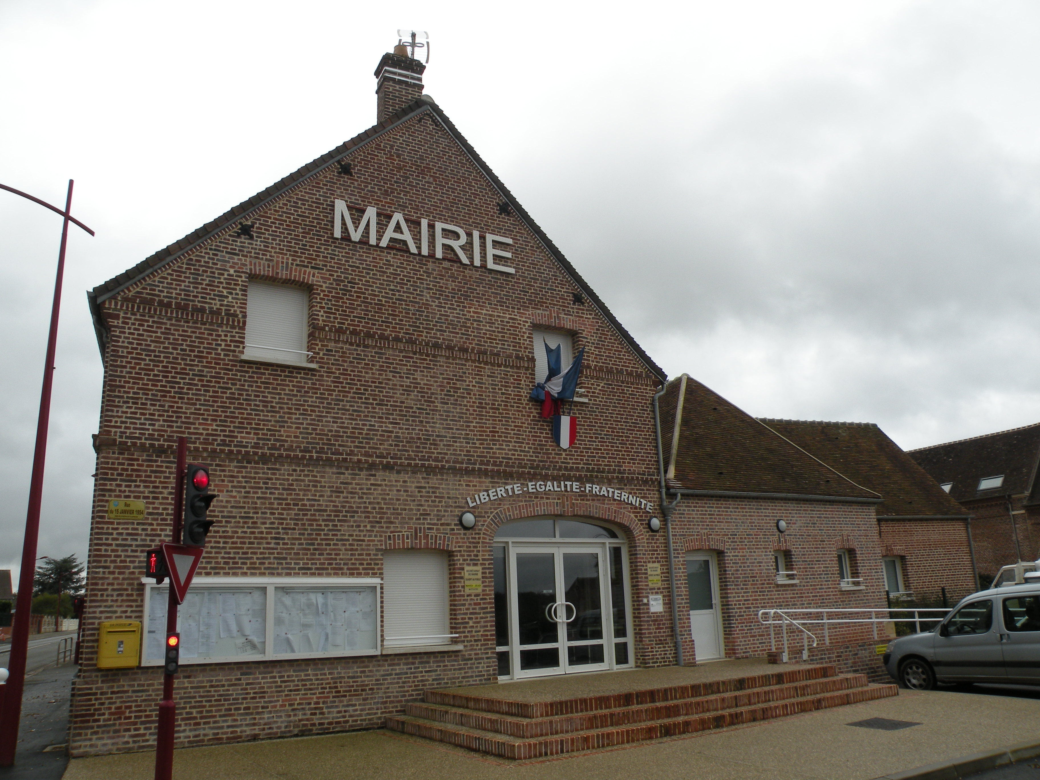 Aux Marais mairie